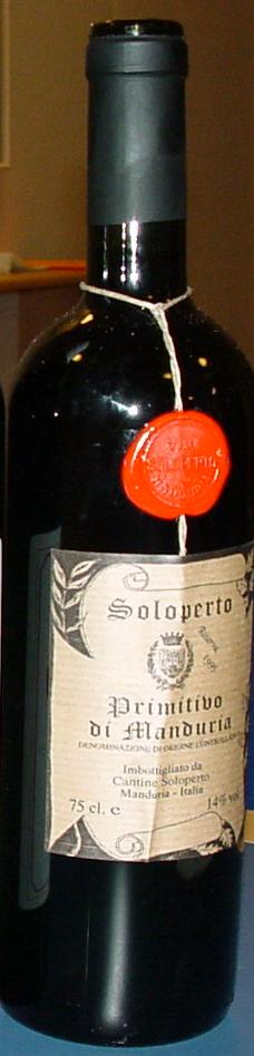 Primitivo di Manduria. Vin fra Syditalien